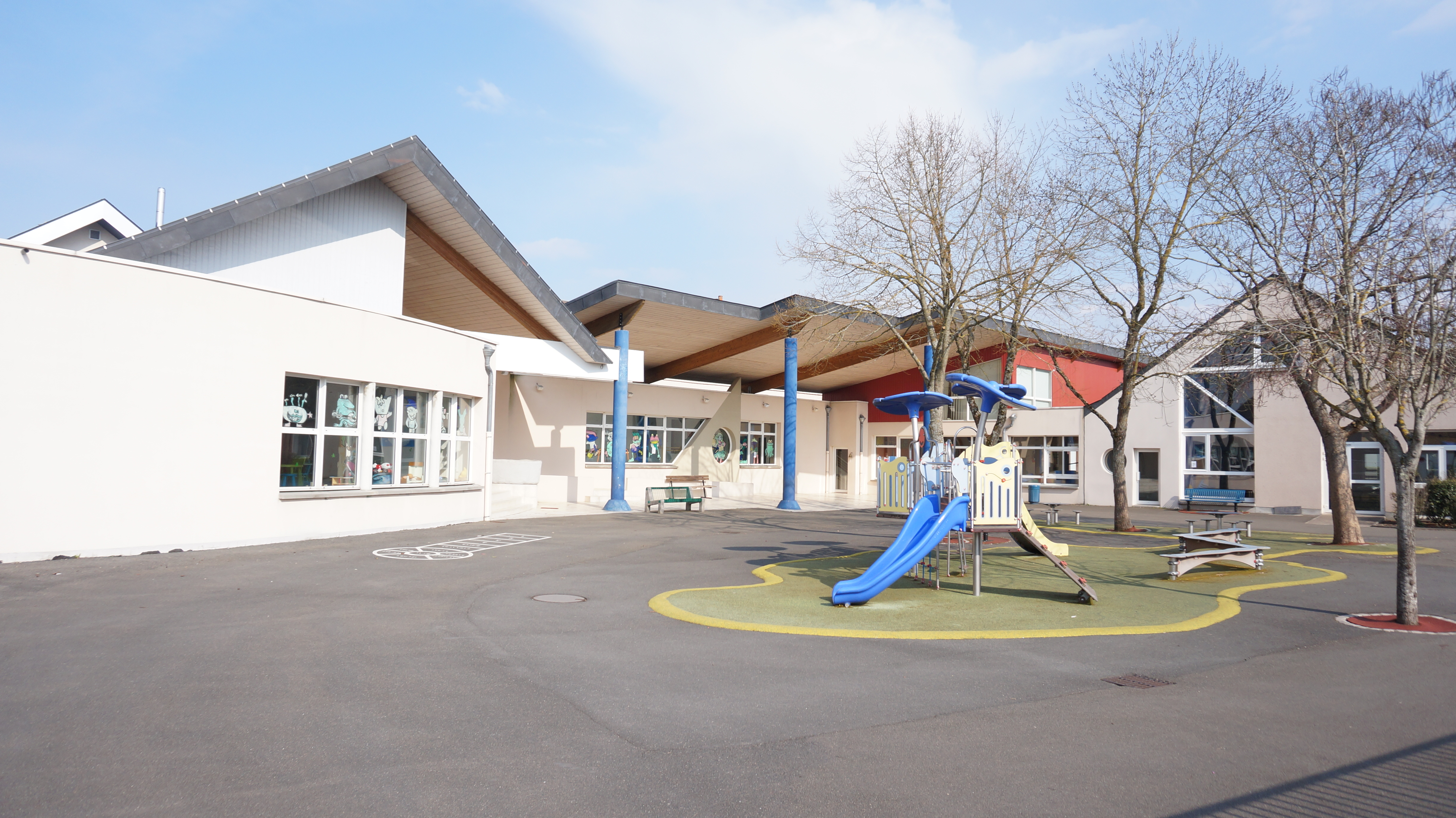 L'école maternelle Saint-Exupéry de la ville de Ormes, dans le département français du Loiret.